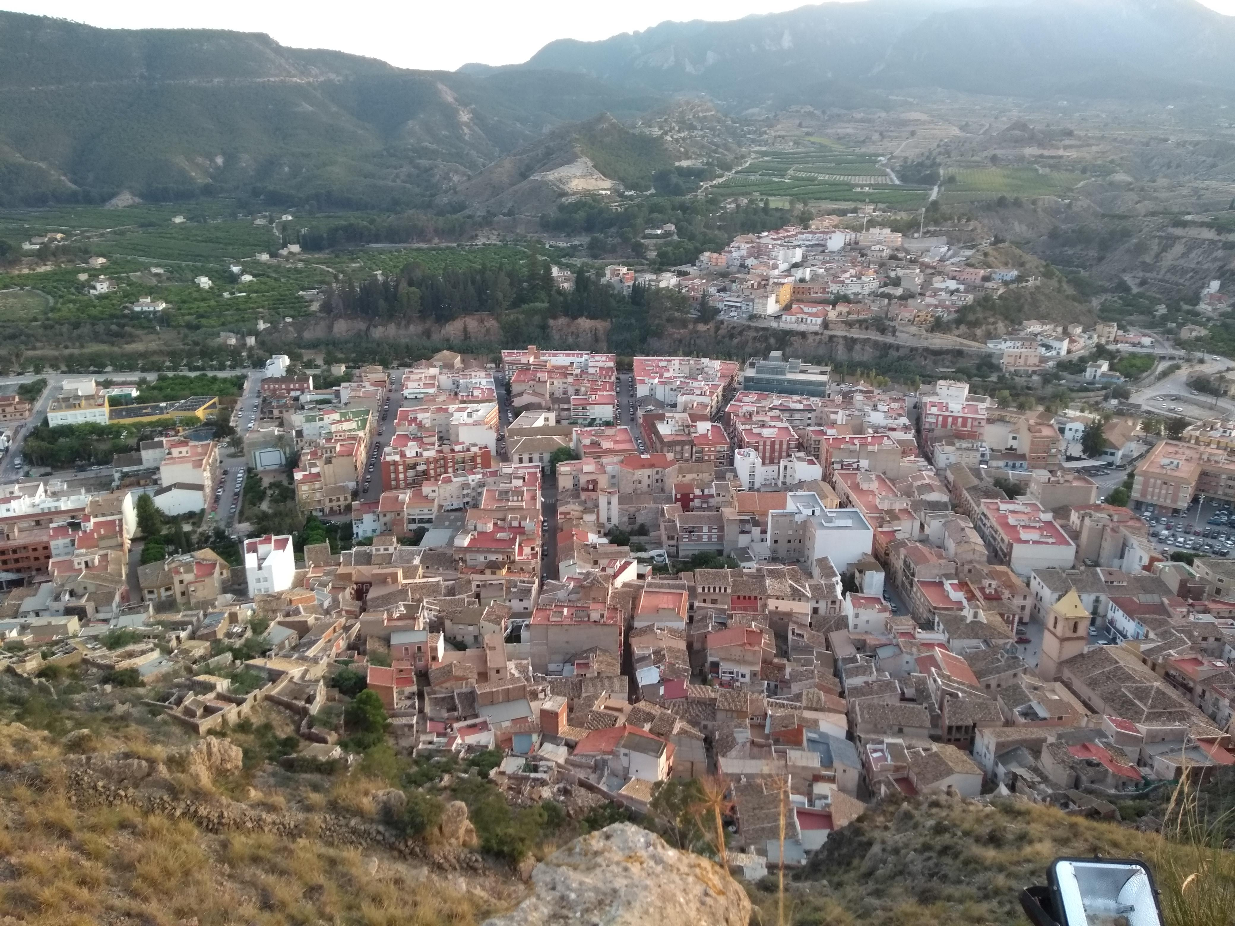 Vista del municipio de Blanca desde la Virgen de Blanca